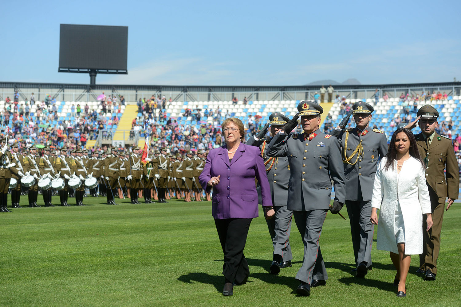 Ministro Elizalde participa de la celebración del Bicentenario de la Batalla de Rancagua